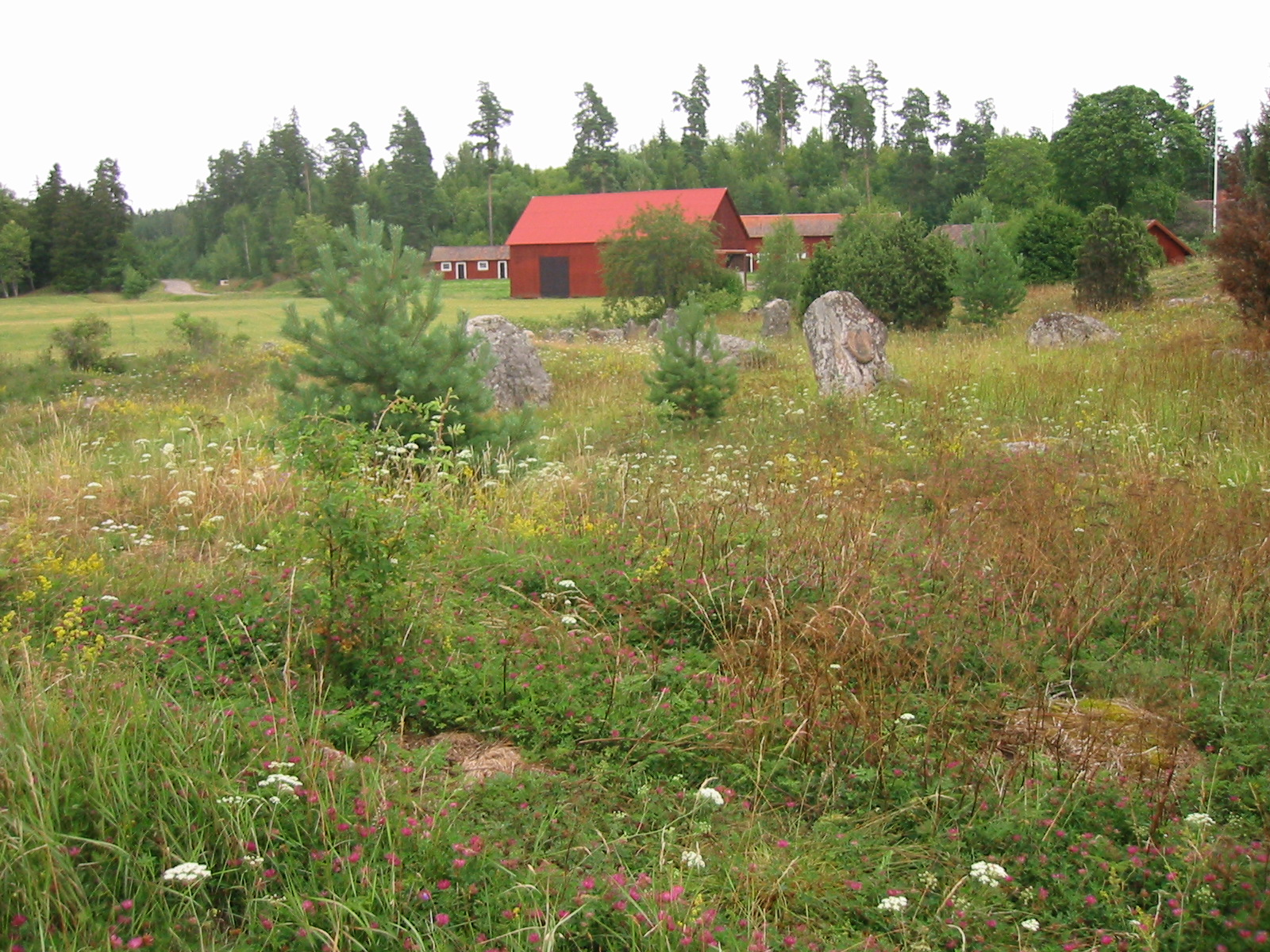 Vy över Årby gravfält, Hallstahammar.